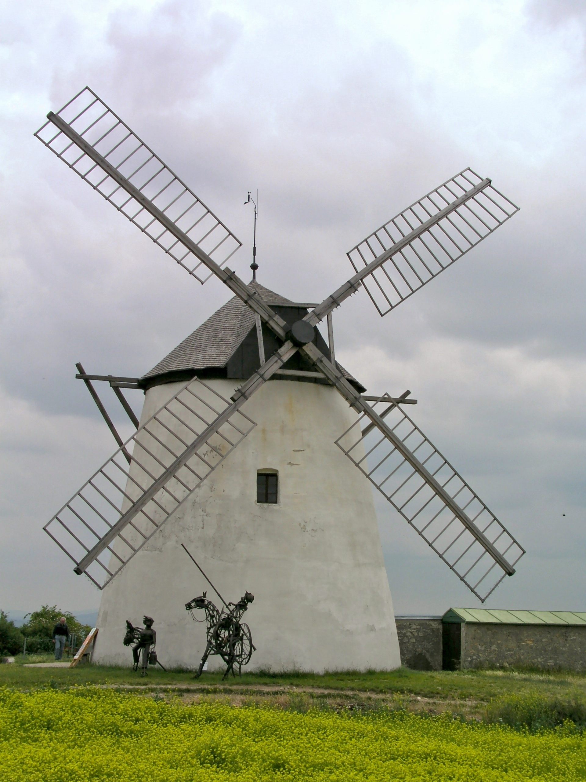 Windmühle